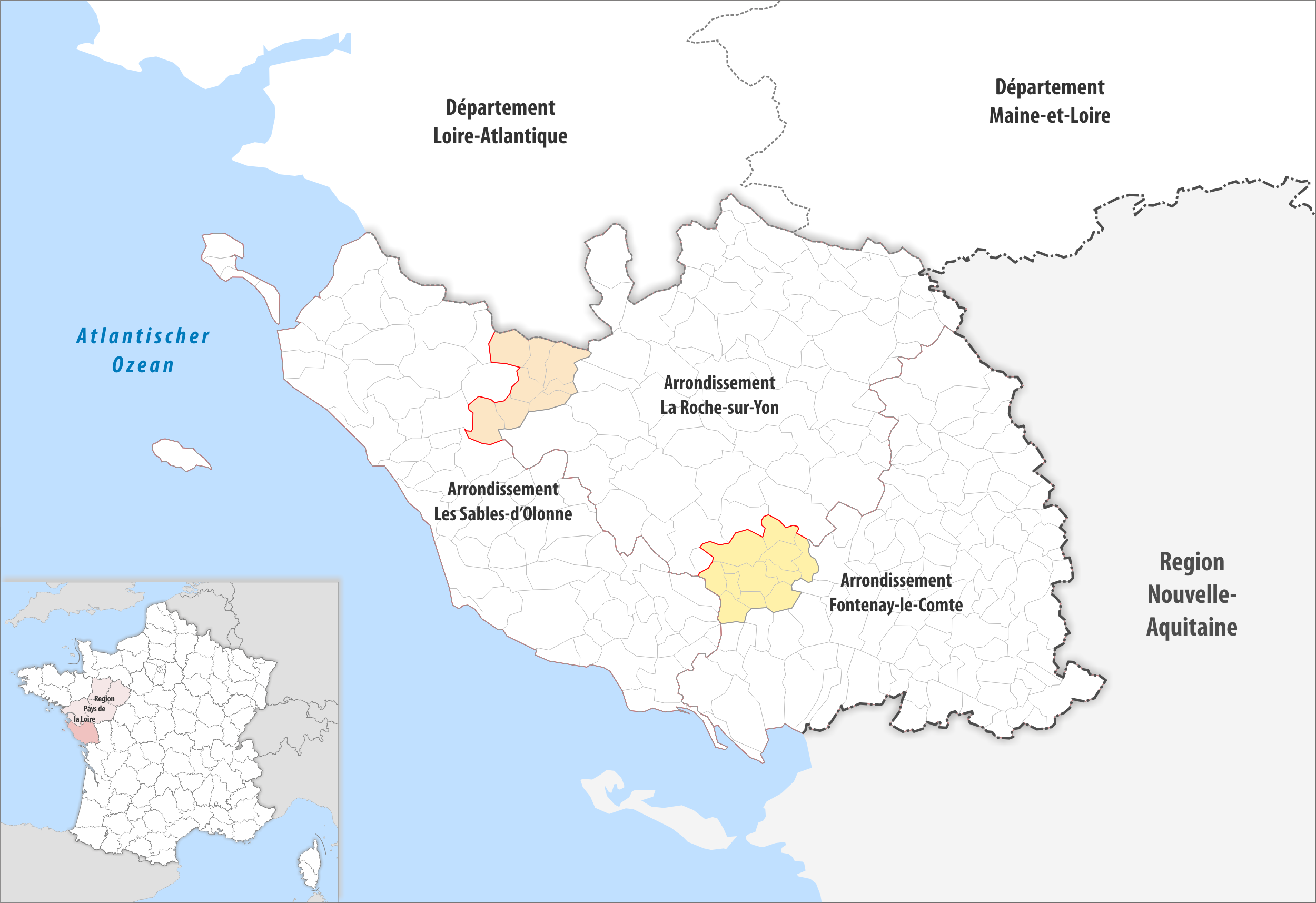 Arrondissements Anpassungen auf 2017 im Departement Vendée